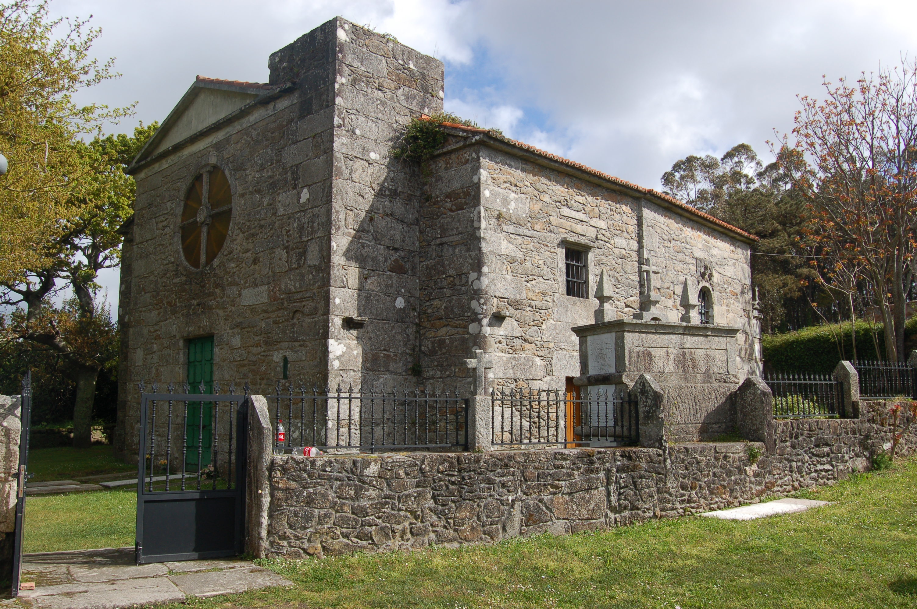 Igrexa parroquial de San Cibrán de Vilastose (Muxía).